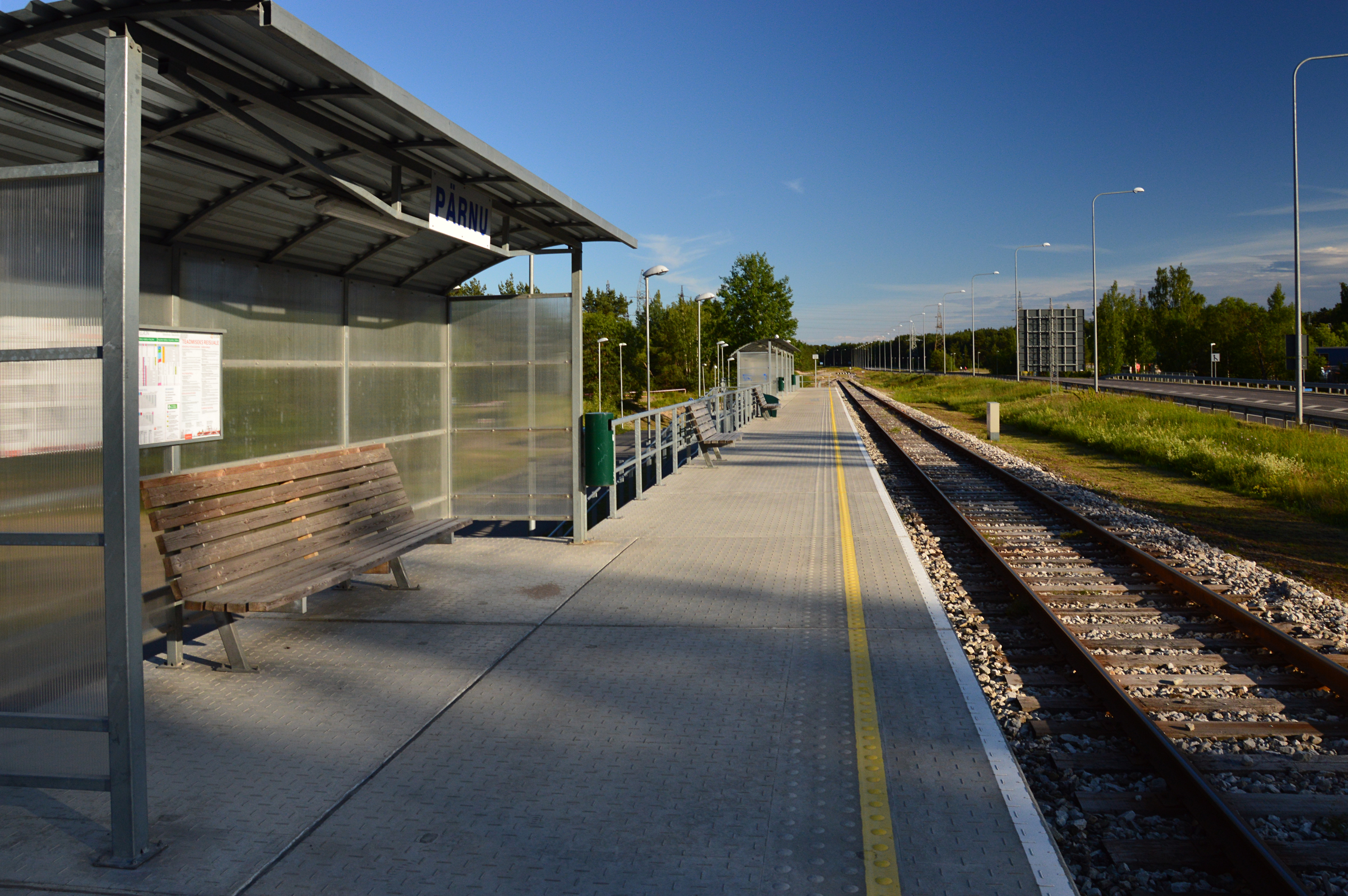 Pärnu raudteepeatus